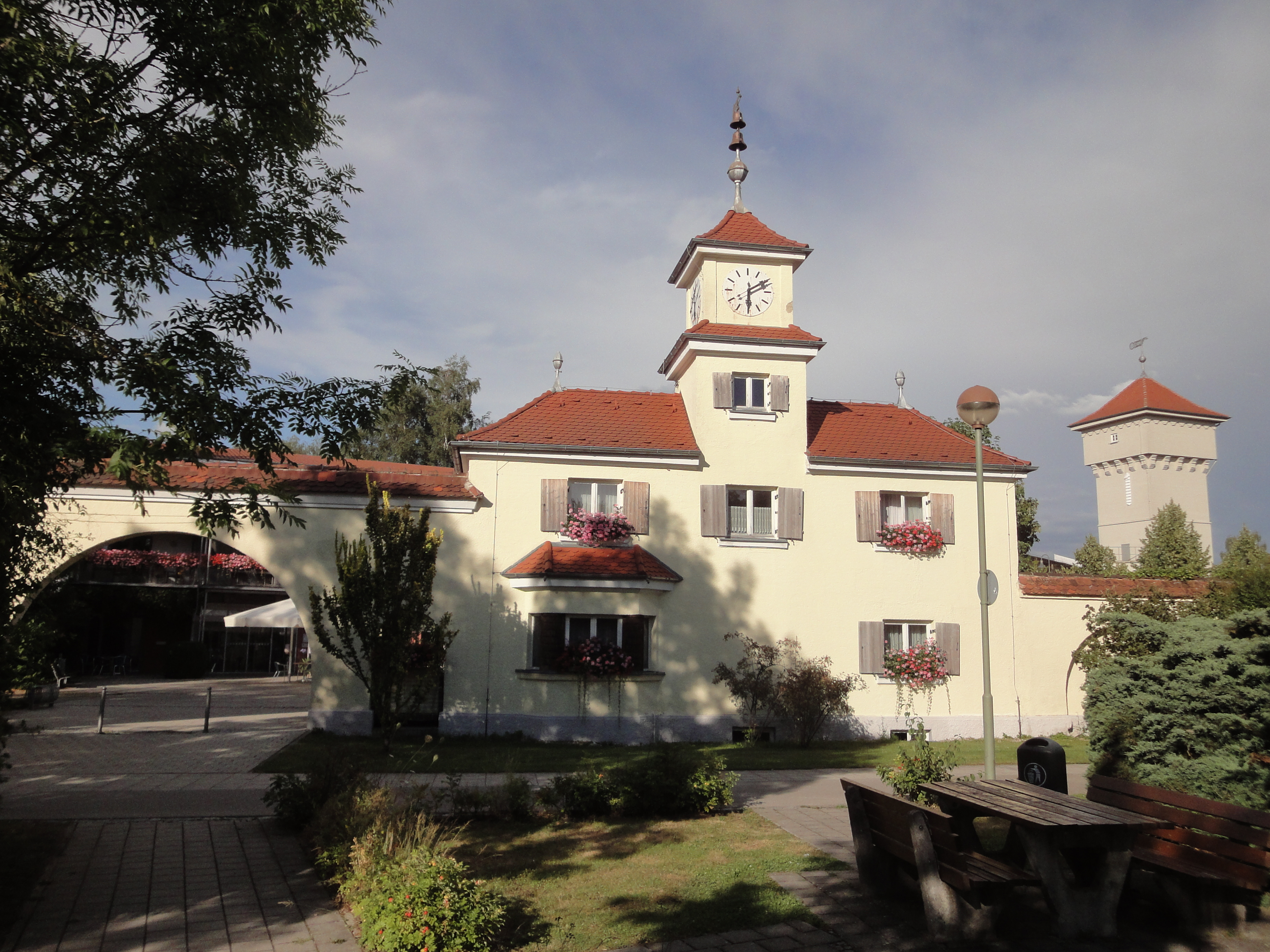 Torhaus, malerischer, zweigeschossiger Gruppenbau mit Walm- bzw. Halbwalmdach und Uhrturm, um 1920; Umfassungsmauer, wohl gleichzeitig; an Torhaus anschließend; Wasserturm, Zeltdachbau über quadratischem Grundriss, auf der Windfahne bez. 1921; auf dem ehem. Fabrikgelände der Keim-Farben-GmbH.